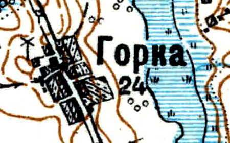 Топографическая карта Ленинградской области, квадрат Vc-29 (Батецкая), деревня Филимонова Горка